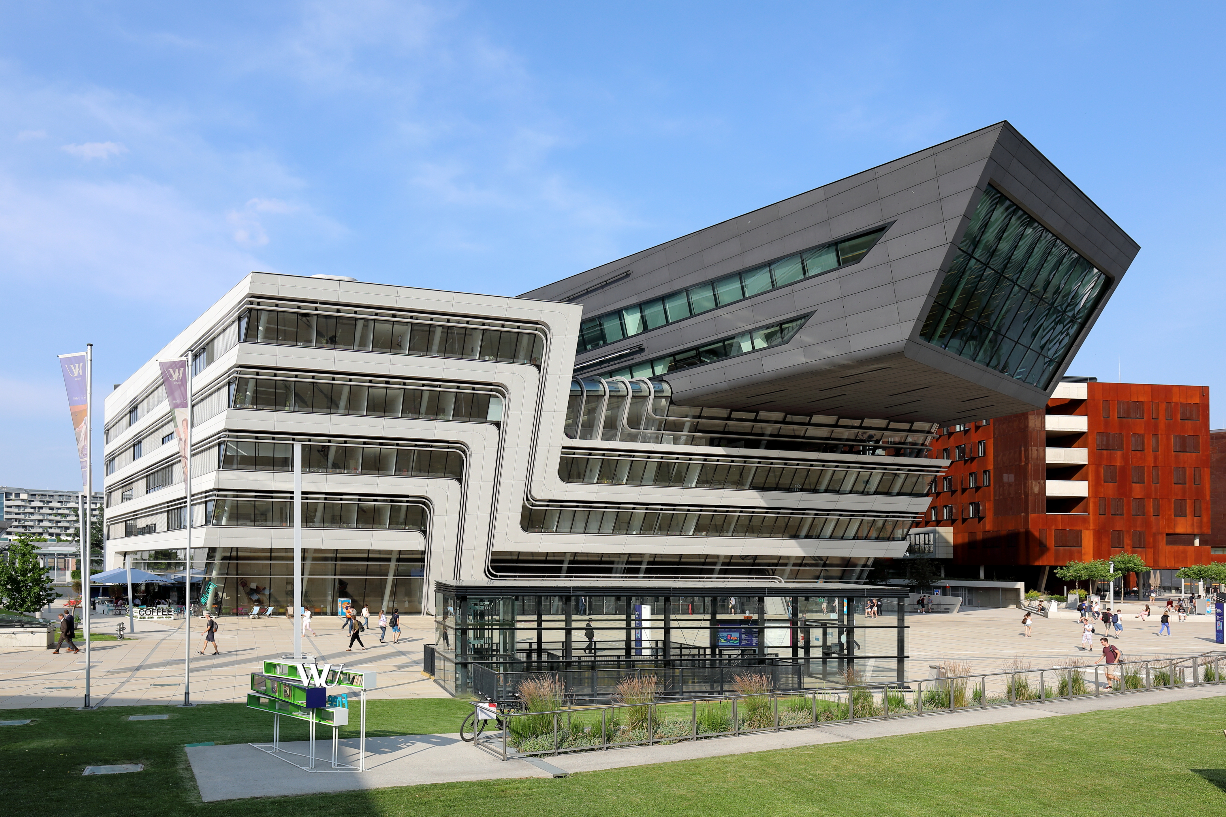 Das Library and Learning Center (LC) des WU Campus der Wirtschaftsuniversität im 2. Wiener Gemeindebezirk Leopoldstadt und rechts das Gebäude „Department 1“ (D1) mit der markanten Cortenstahl-Fassade. Der Campus mit rund 35.000 m² verbauter Grundfläche und etwa 55.000 m² öffentlich zugänglicher Freifläche wurde von 2009 bis 2013 auf dem südwestlichen Teil des einstigen Weltausstellungs- und späteren Messegeländes am Nordostrand des Wiener Praters um rund eine halbe Milliarde Euro errichtet. Das Library and Learning Center plante das Architekturbüro von Zaha Hadid.